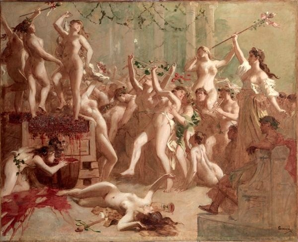 Fête de vendange donnée par Messaline dans le palais de Claude en l'honneur de son amant Silius Harvest feast given by Messalina in the palace of Claudius in honor of her lover Silius oil on canvas Size: 110 x 136.5 cm. (43.3 x 53.7 in.)